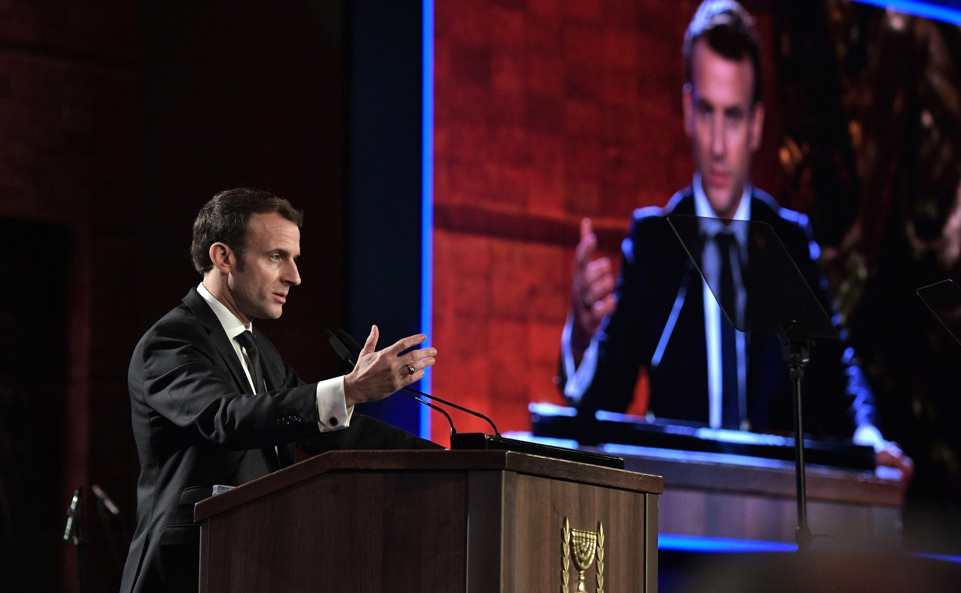 Президент Франции Эммануэль Макрон на форуме «Сохраняем память о Холокосте, боремся с антисемитизмом».